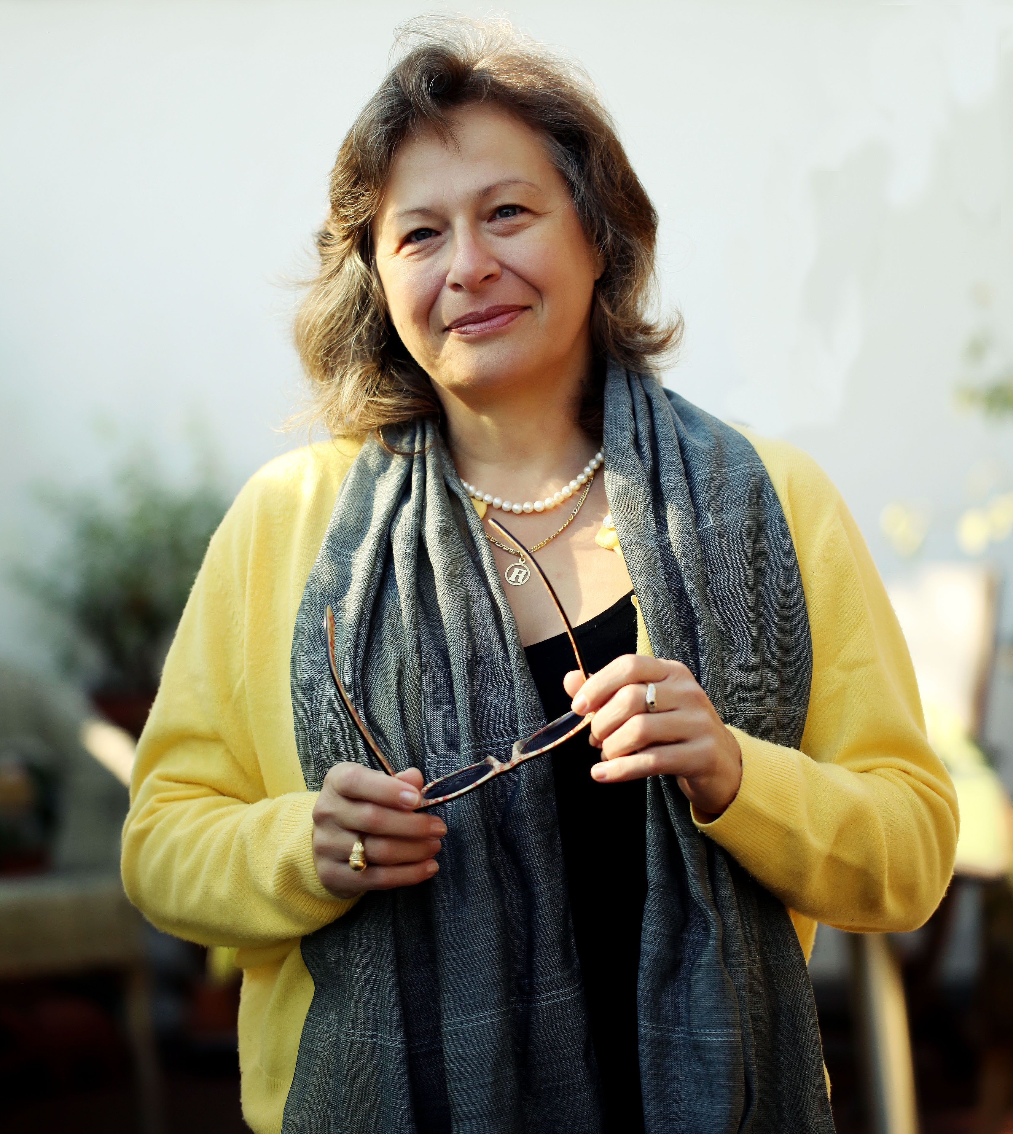 Portraitfoto Edit Engelmann